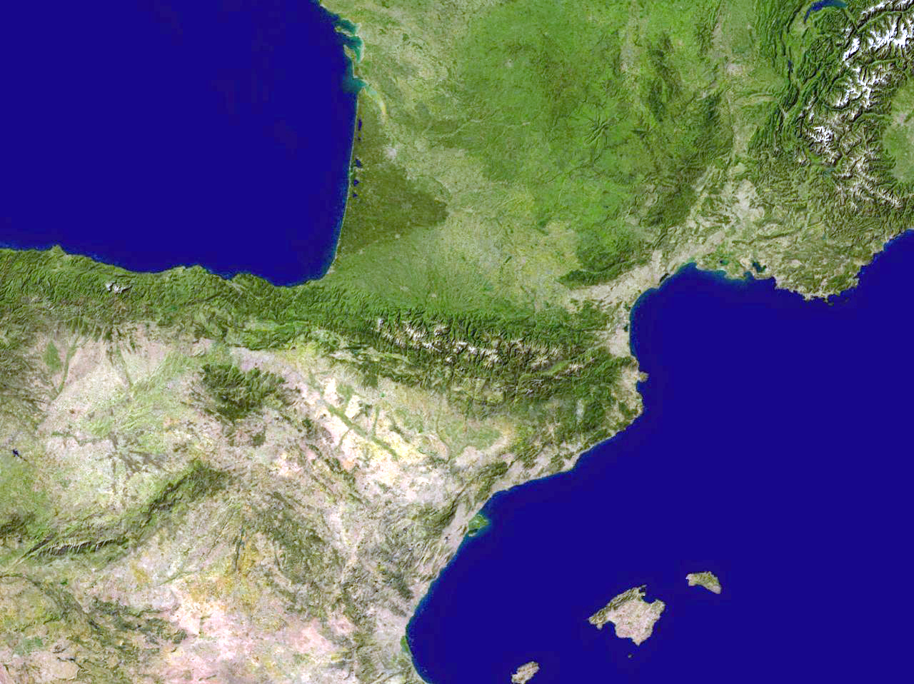 Pyrenäen vum Satellit aus.